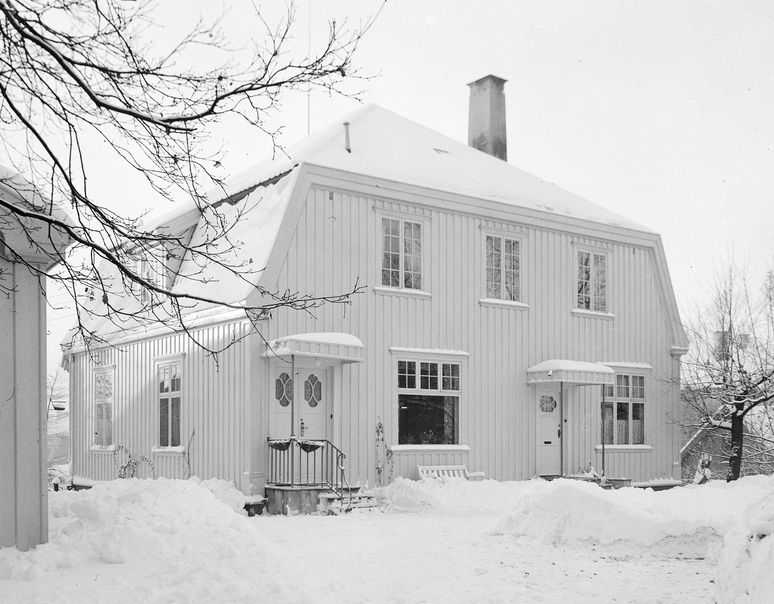 Villa i Professor Dahls gate 48, fotografert januar 1948